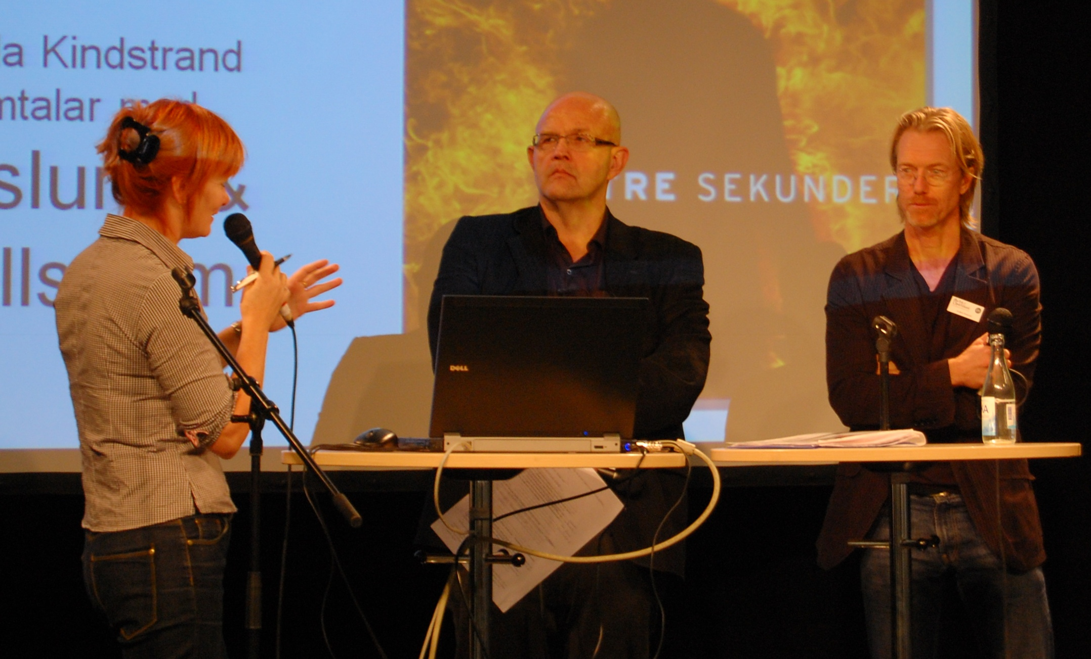 Författarduon Roslund och Hellström på Bokmässan 2009. Foto: Lennart Guldbrandsson (Hannibal)